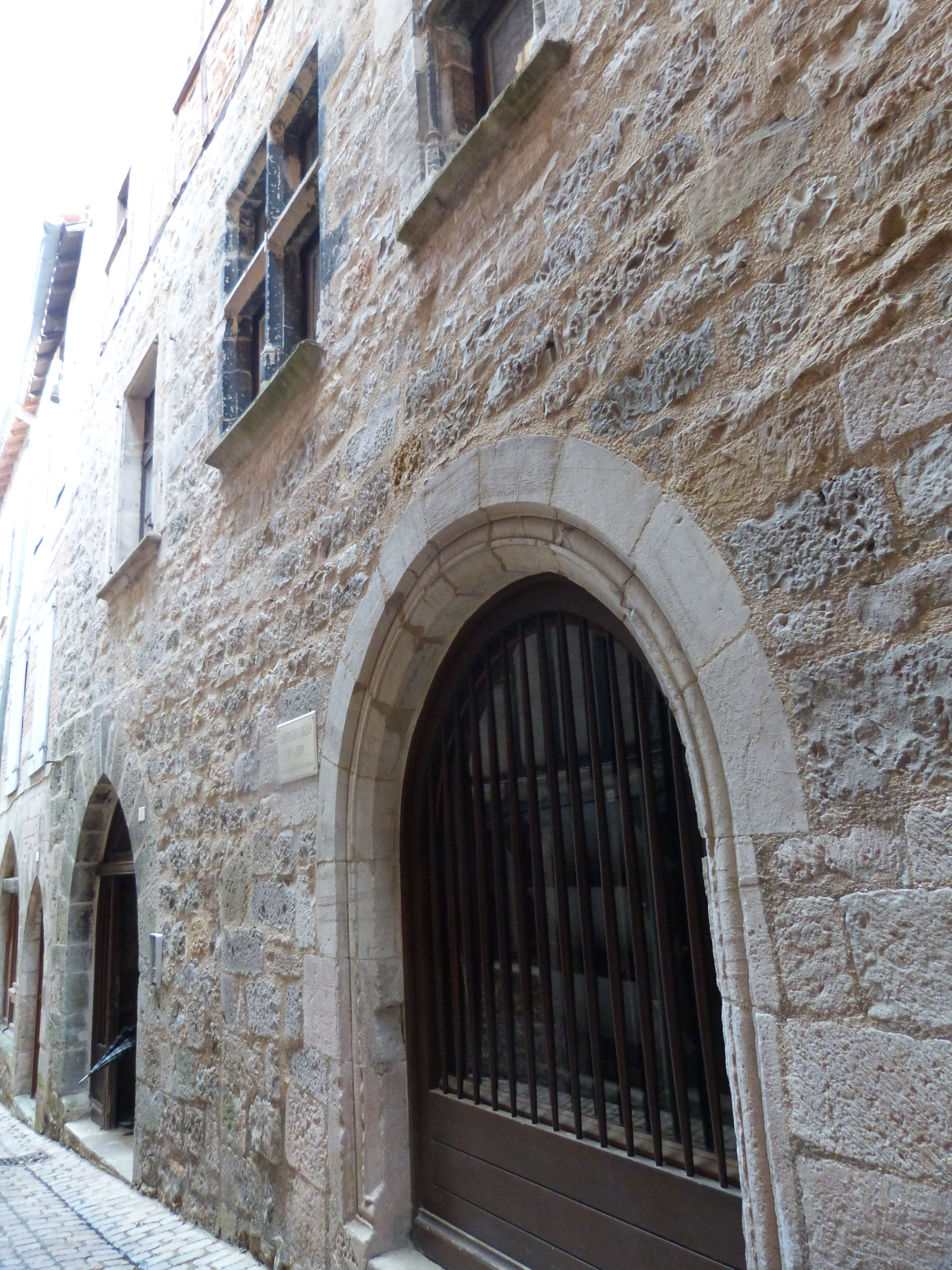 Caserne des Anglais (Inscrit) .